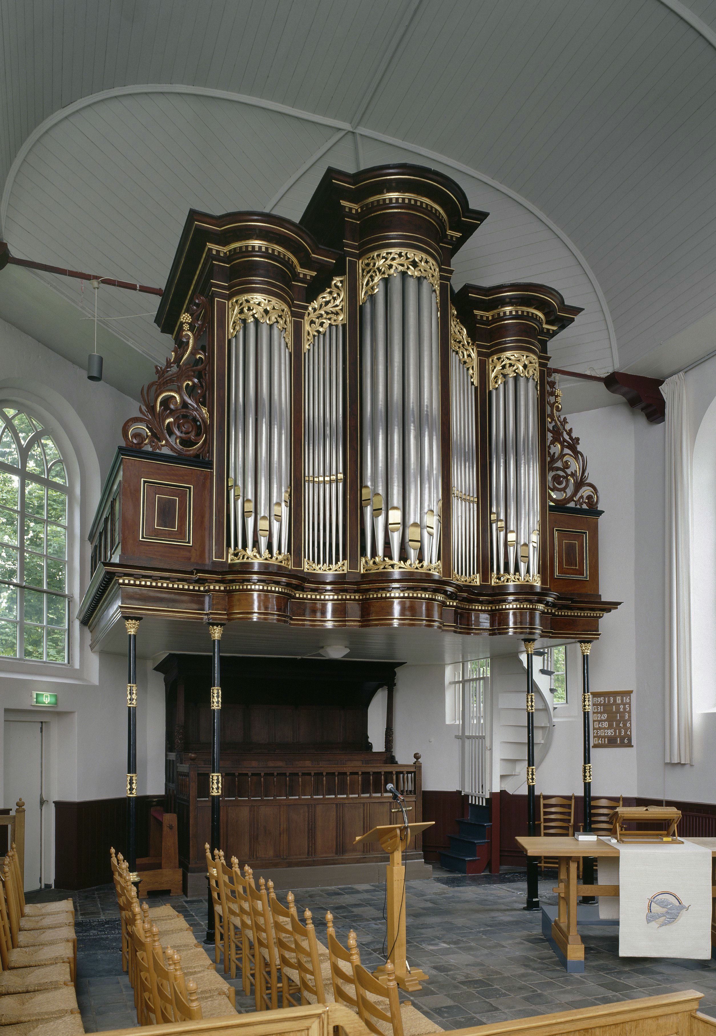 Nederlands Hervormde Kerk: Interieur, aanzicht orgel, orgelnummer 1154 (opmerking: Gefotografeerd voor Het Historische Orgel in Nederland 1865-1872)